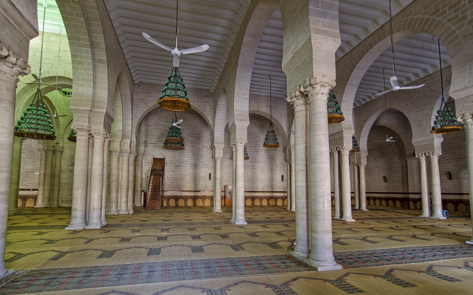 Grande mosquée et son ancien minaret, Mahdia